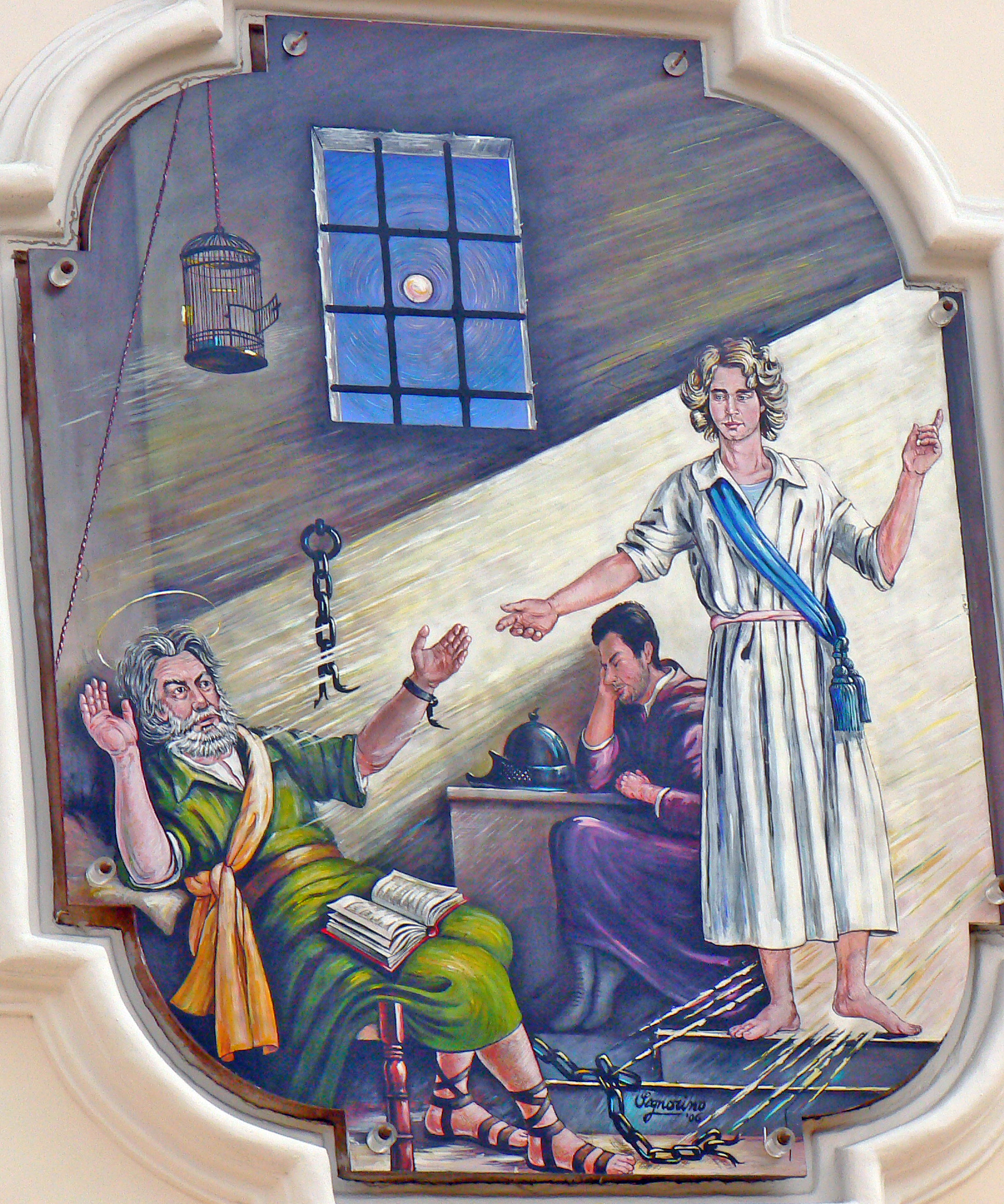 Salerno: San Pietro in vinculi